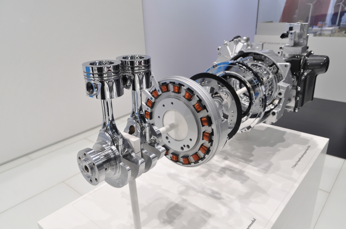 Messe i-Mobility 2012 in Stuttgart Dieses Foto entstand durch Unterstützung des gemeinnützigen Vereins Skillshare.eu Skillshare e.V. ist ein eingetragener gemeinnütziger Verein zur Förderung der Bildung durch Unterstützung der Erstellung, Sammlung und Verbreitung so genannten freien Wissens. IBAN: DE16 8306 5408 0004 8850 66 BIC: GENODEF1SLR Bank: VR-Bank Altenburger Land